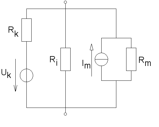 Példa-áramkör a Millman-tételhez